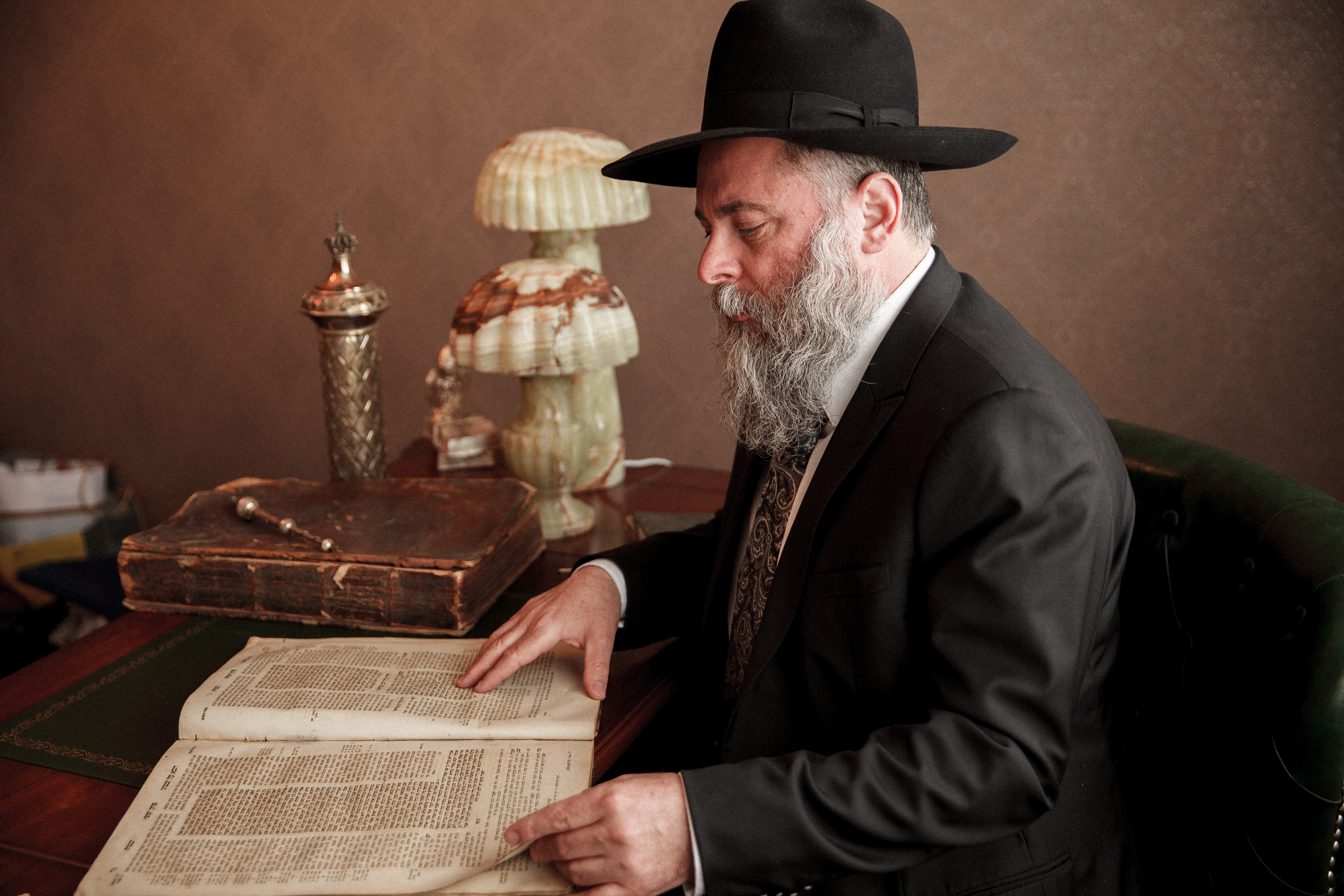 Маркович, Йонатан Биньямин